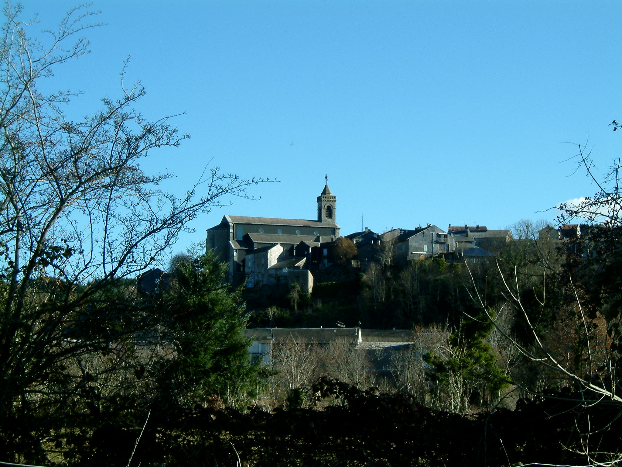 réalisée par Yves - La Salvetat-sur-Agout (Hérault) , vue générale.